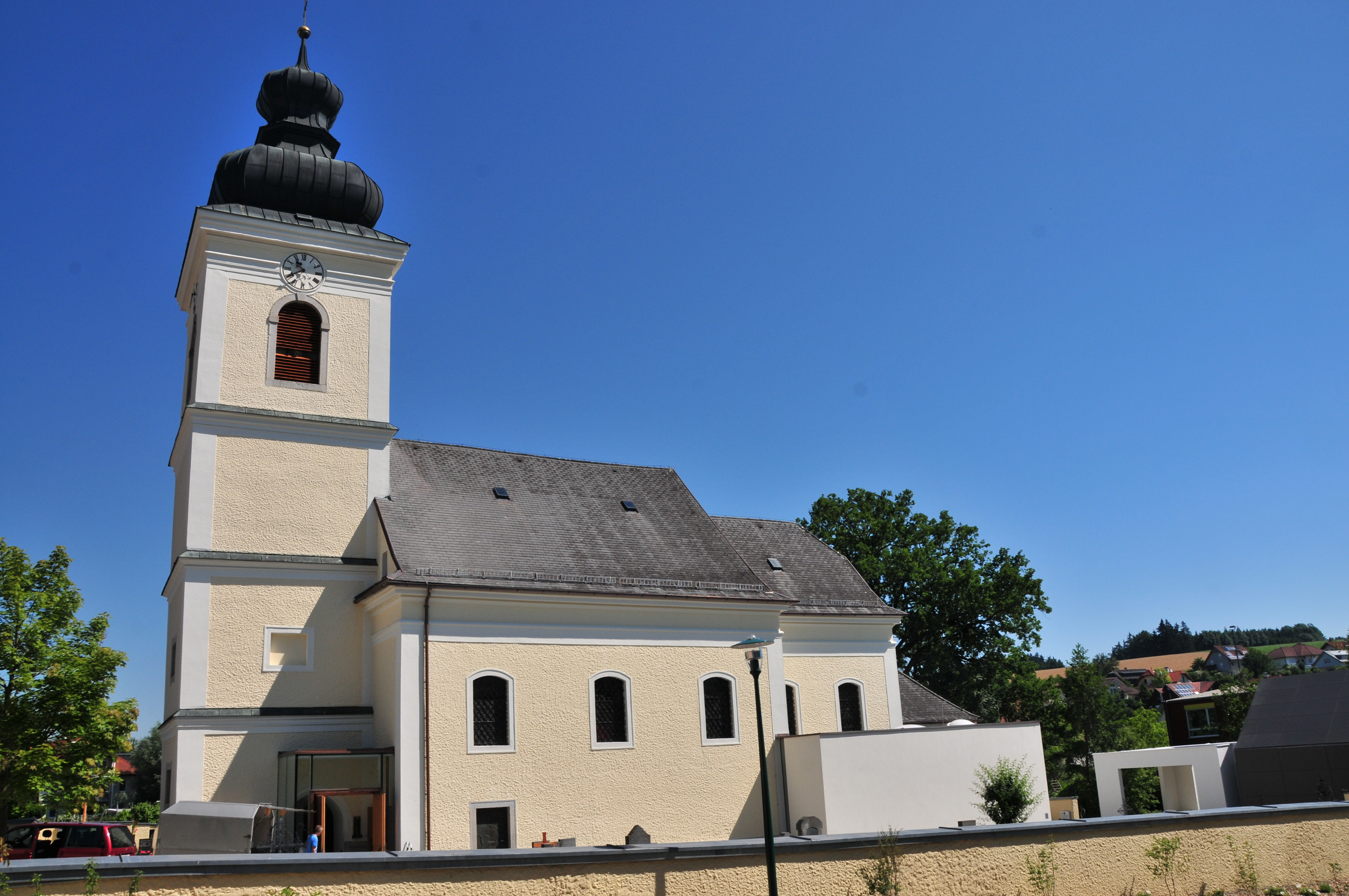 Kath. Pfarrkirche hl. Stephan und Friedhof